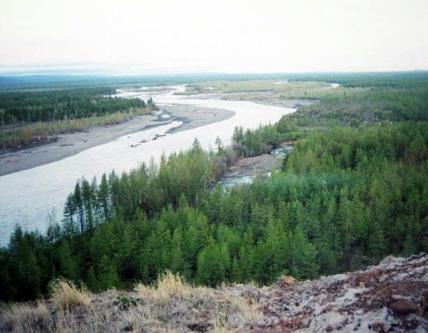 Р.Зырянка